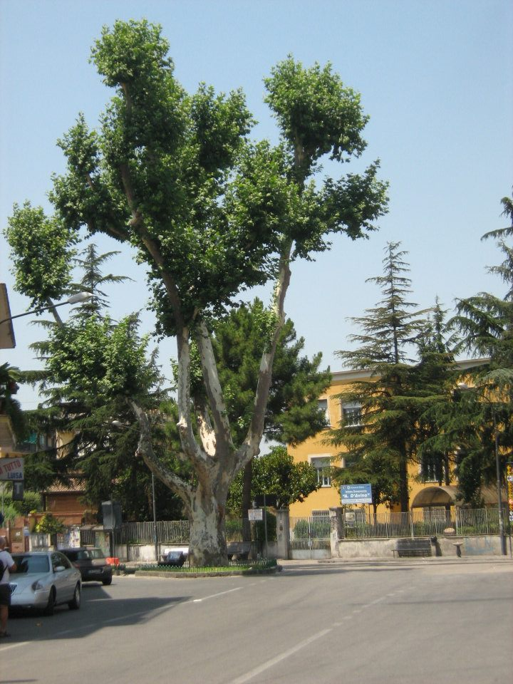 Platano Bisecolare a Striano (Na)